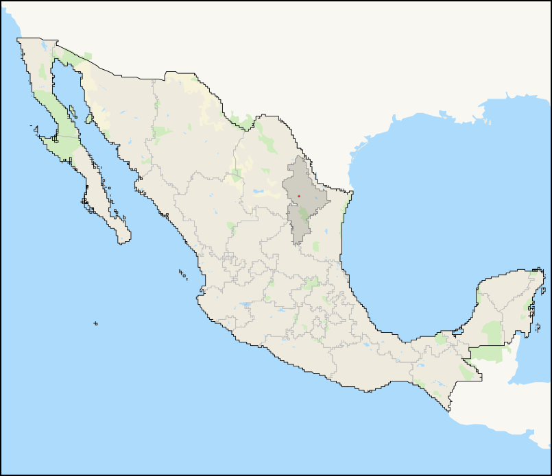 Mapa del distrito electoral federal 8 de Nuevo León ubicado en México